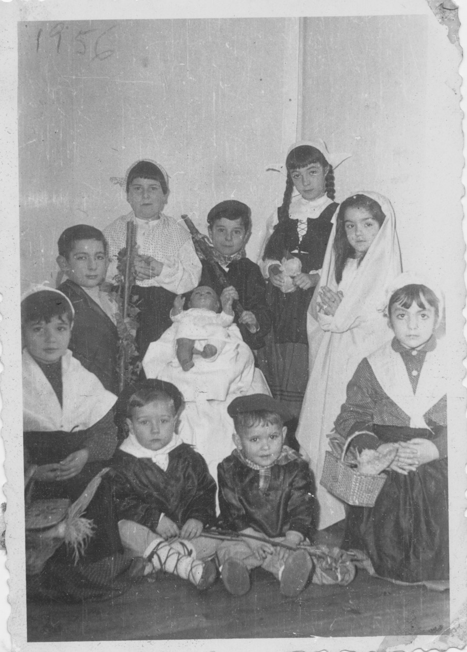 Maria Dolores Goya Ikastolako haurrak 1956